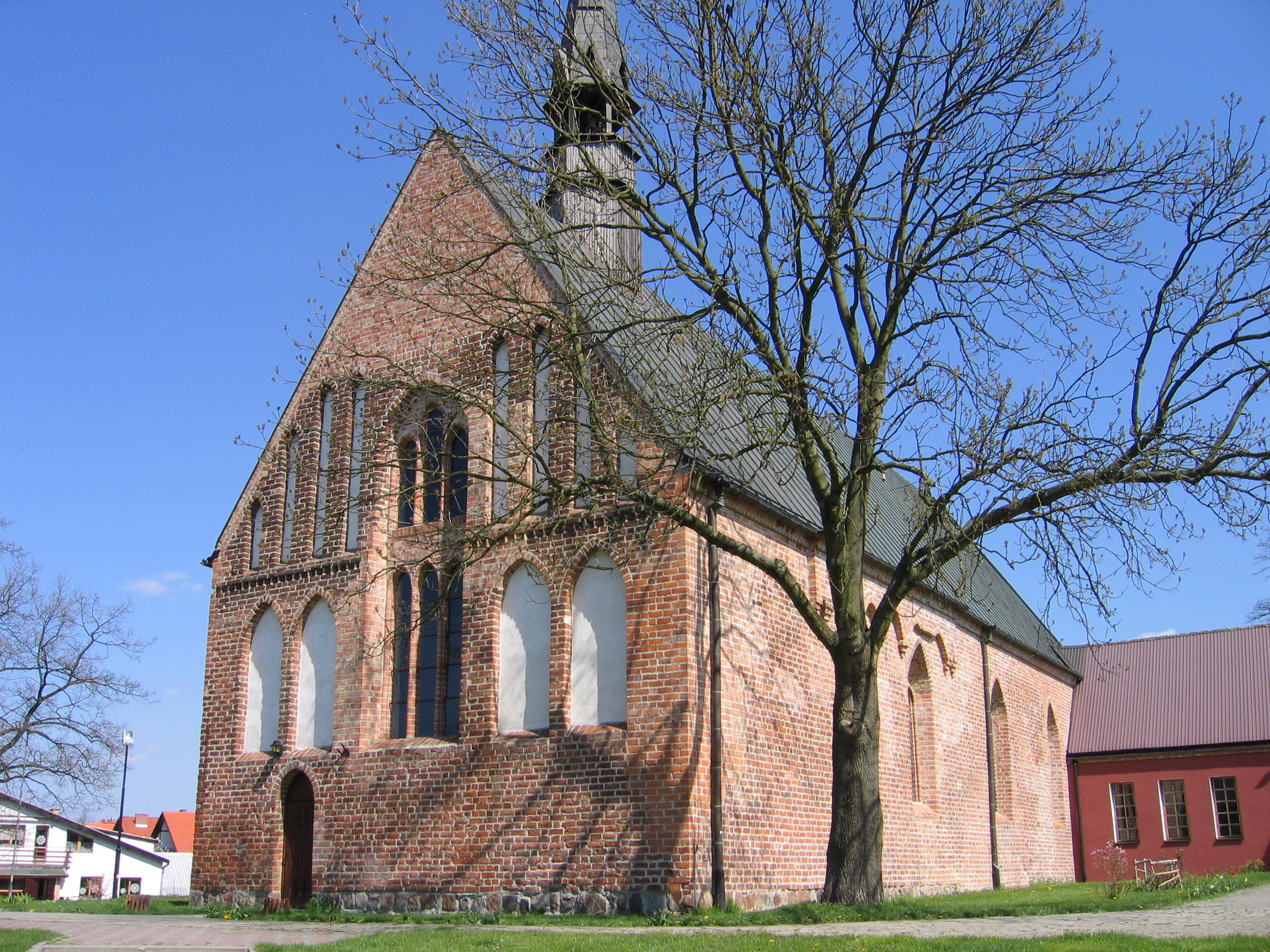 Pyrzyce, ul. Staromiejska 28 - dawny kościół klasztorny augustianów, obecnie parafialny p.w. MB Bolesnej